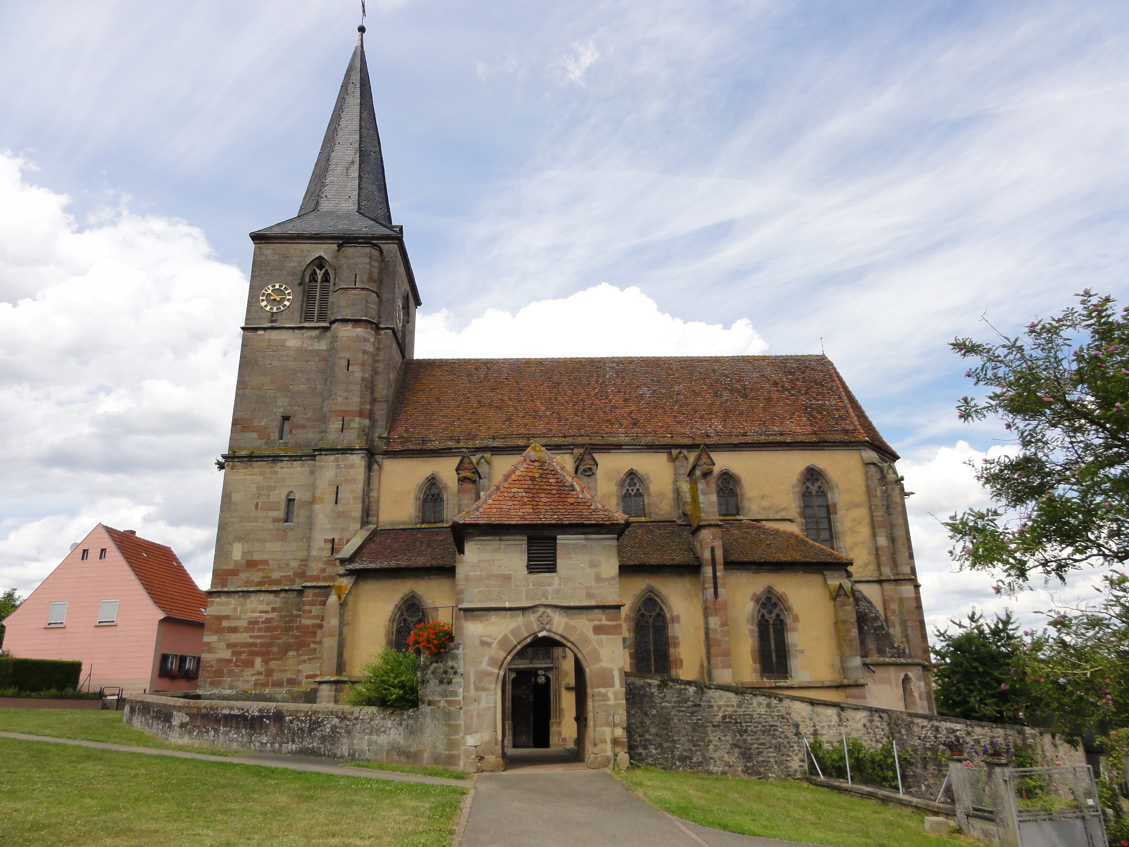 Alsace, Bas-Rhin, Église protestante Saint-Gall de Domfessel (PA00084693, IA67005785).Façade sud avec enceinte fortifiée et porche d'accès.